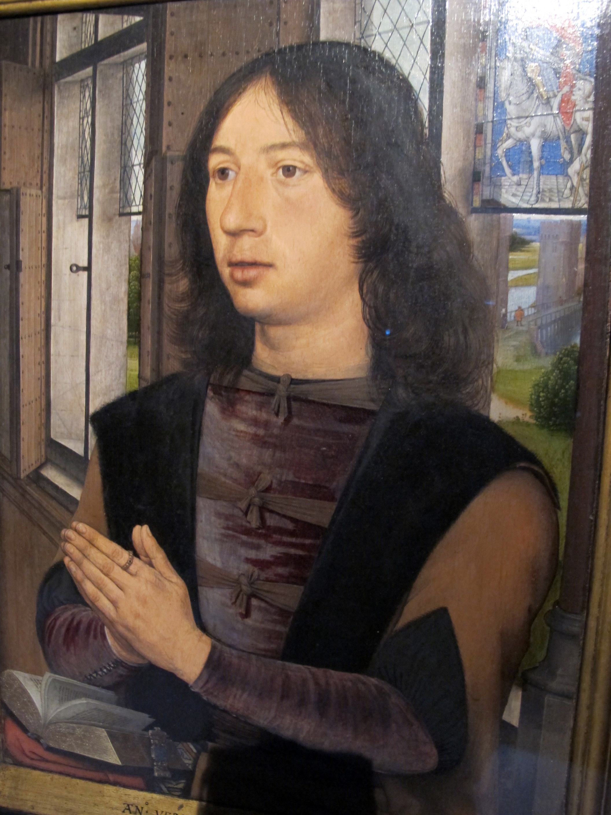 Hans memling, dittico di maarten van nieuwenhove, 1487